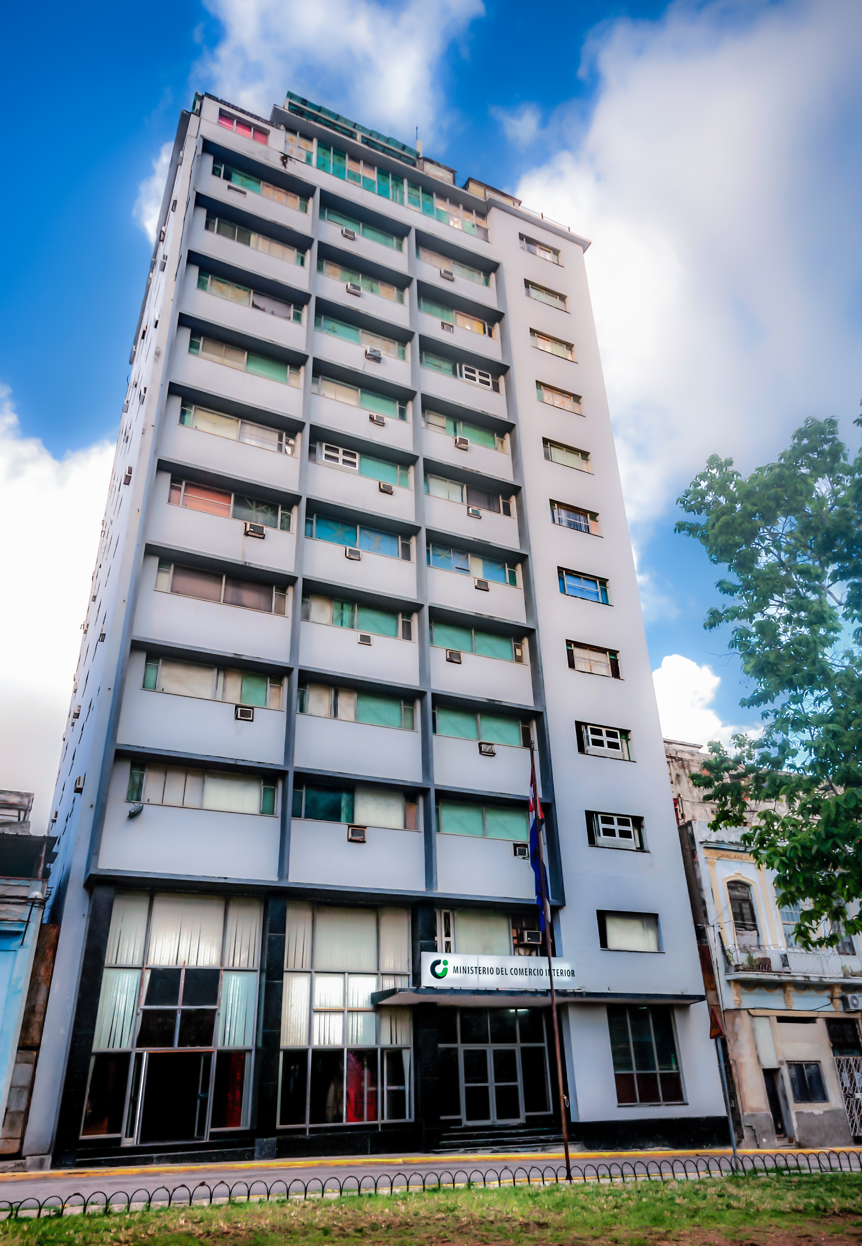 Ministerio del Comercio Interior (MINCIN) en La Habana, Cuba.